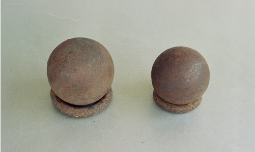 boules métalliques utilisées par le style naturel